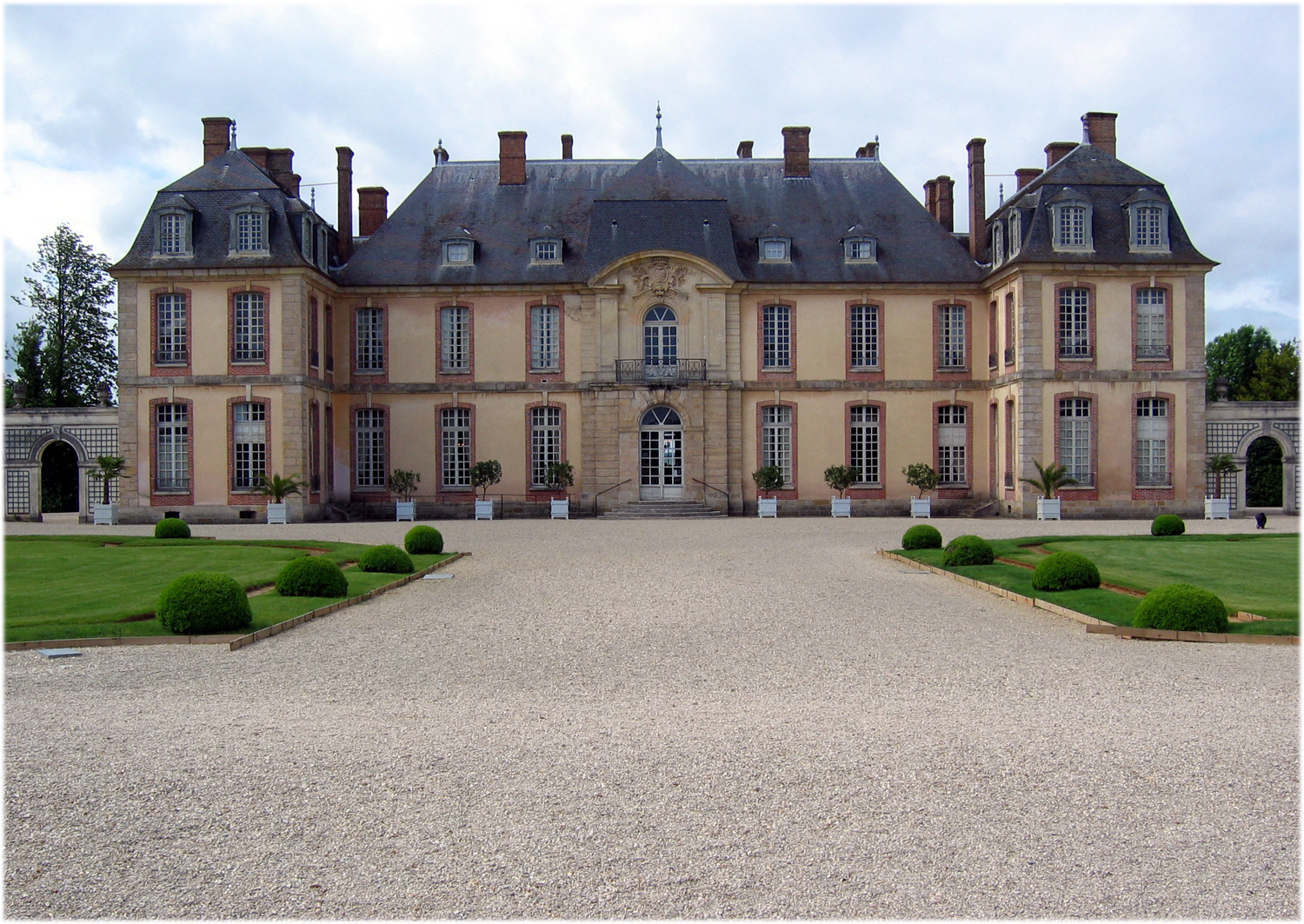 Château de La Motte-Tilly depuis l'entrée principale